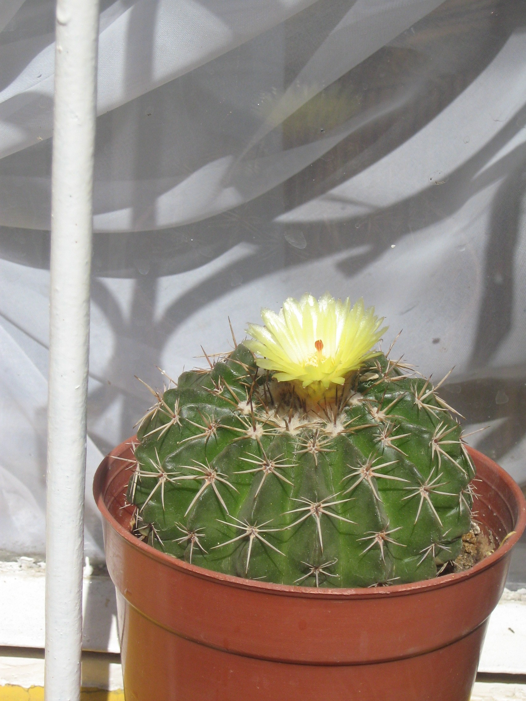 Notocactus/Wigginsia/Malacocarpus ~ Parodia erinacea (Wigginsia)